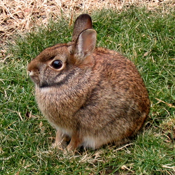 A Rabbit, taken in Urbana, IL